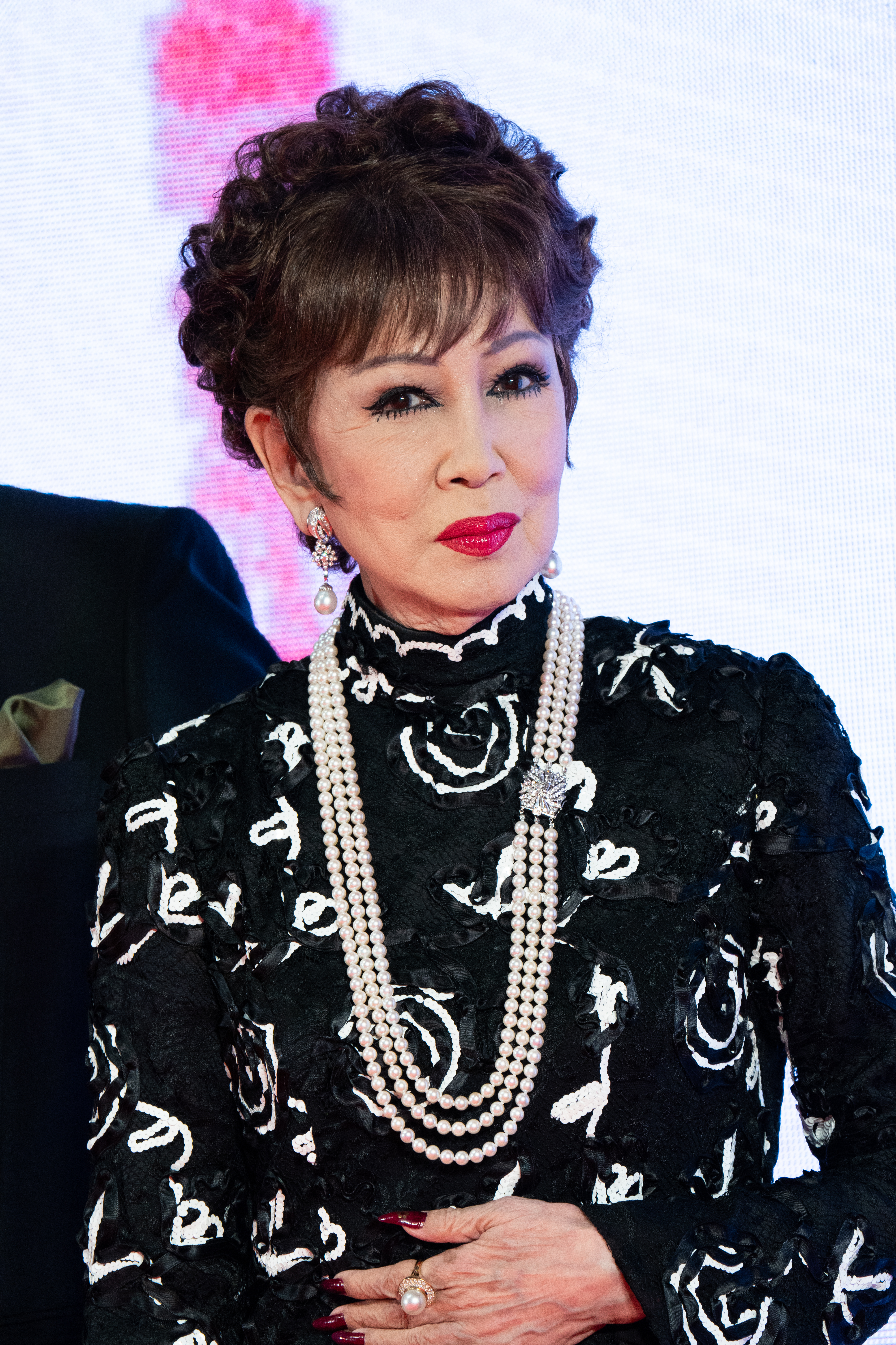 第32回 東京国際映画祭 オープニングセレモニー 浅丘ルリ子 (男はつらいよ お帰り 寅さん)